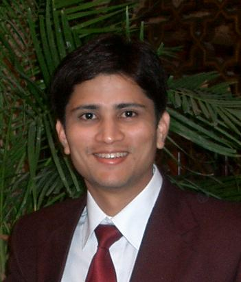 Indian badminton player Chetan Anand